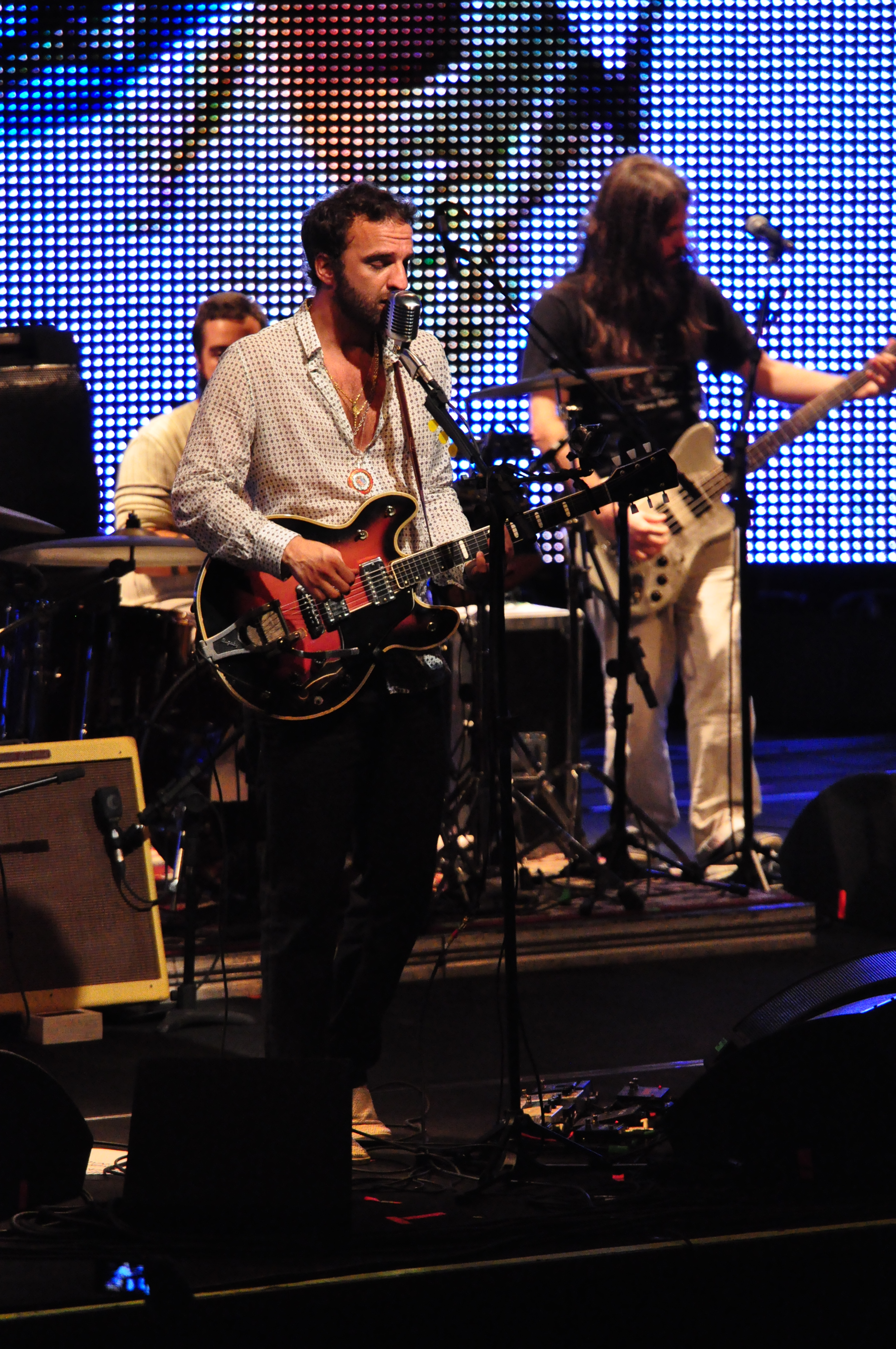 Foto: Priscila Leal